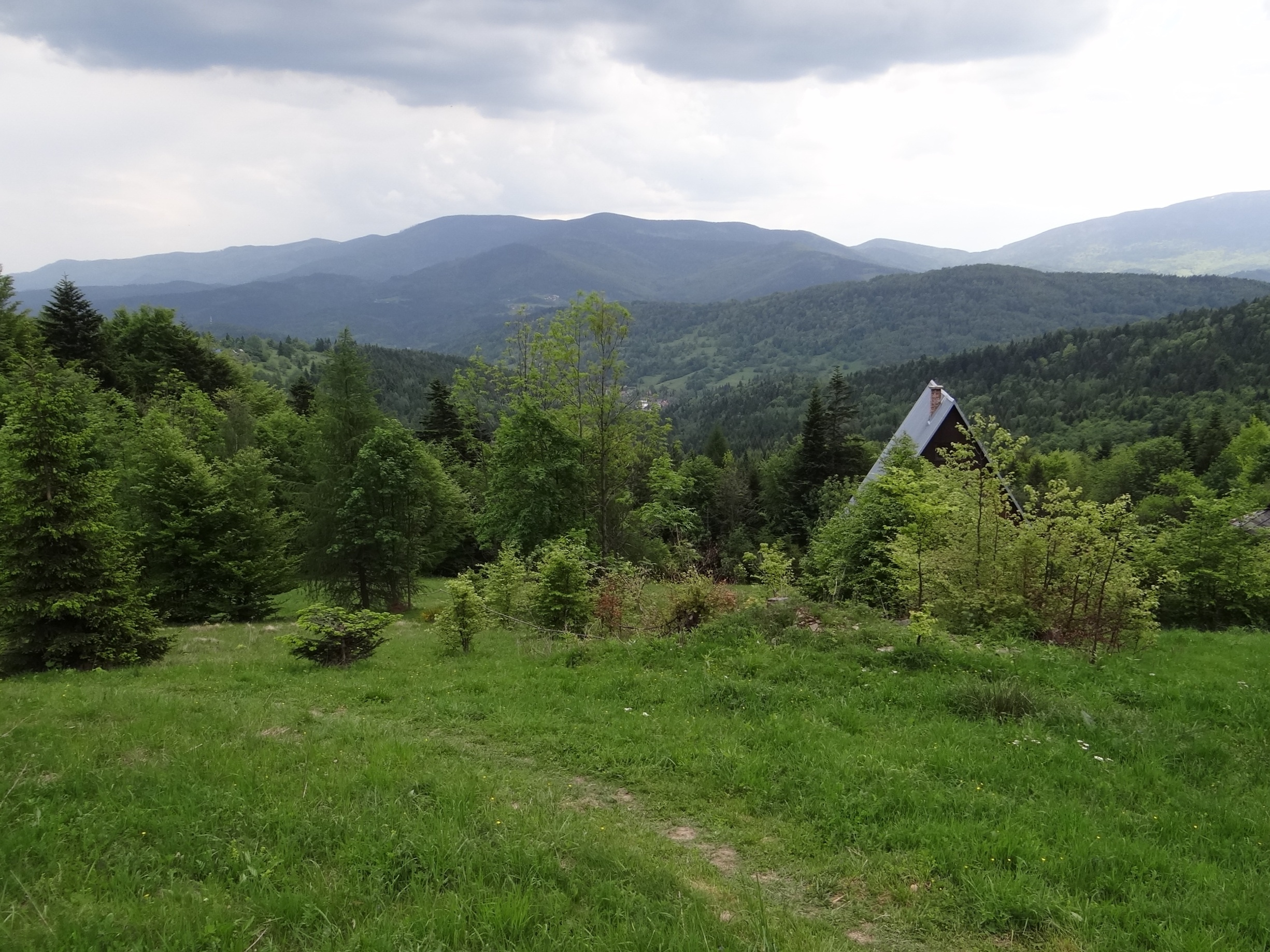 Osiedle Opaczne pod Jałowcem w Paśmie Przedbabiogórskim. Widok na Pasmo Policy